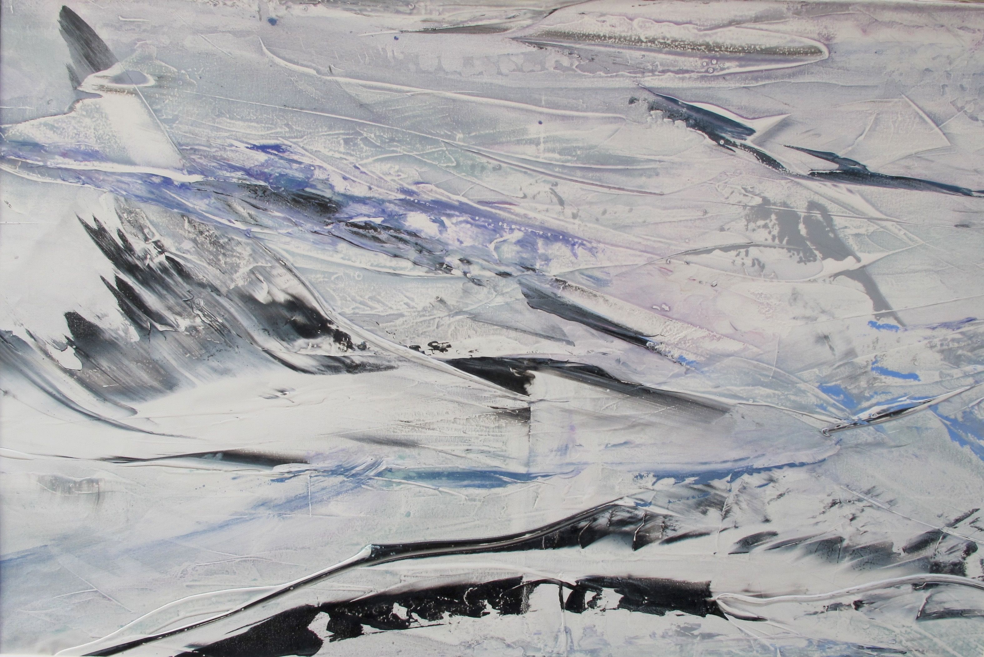 Eva Maria Enders: Flügelschlag, 2015 Mischtechnik auf Leinwand